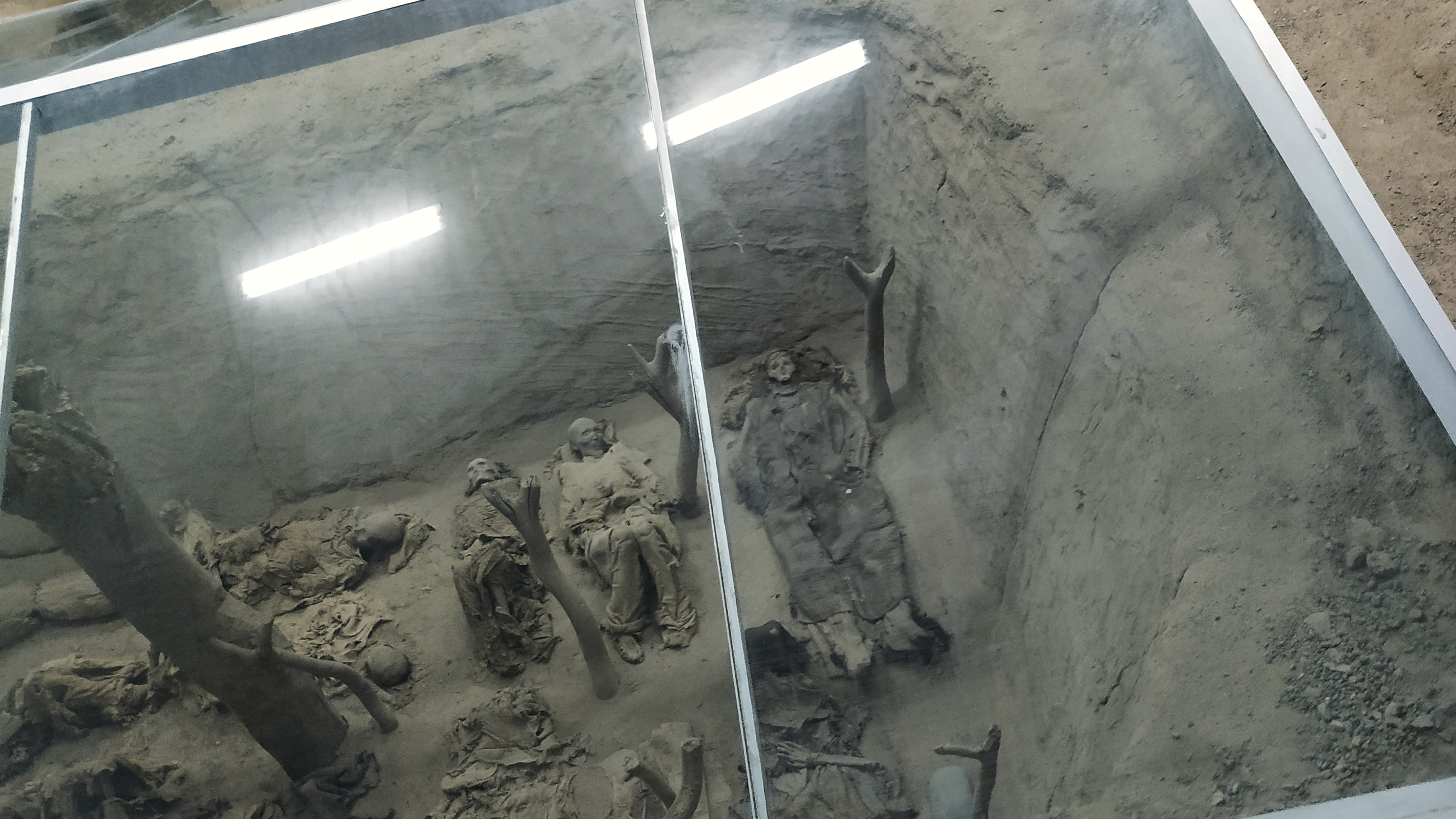 中文（中国大陆）: 扎滚鲁克古墓群